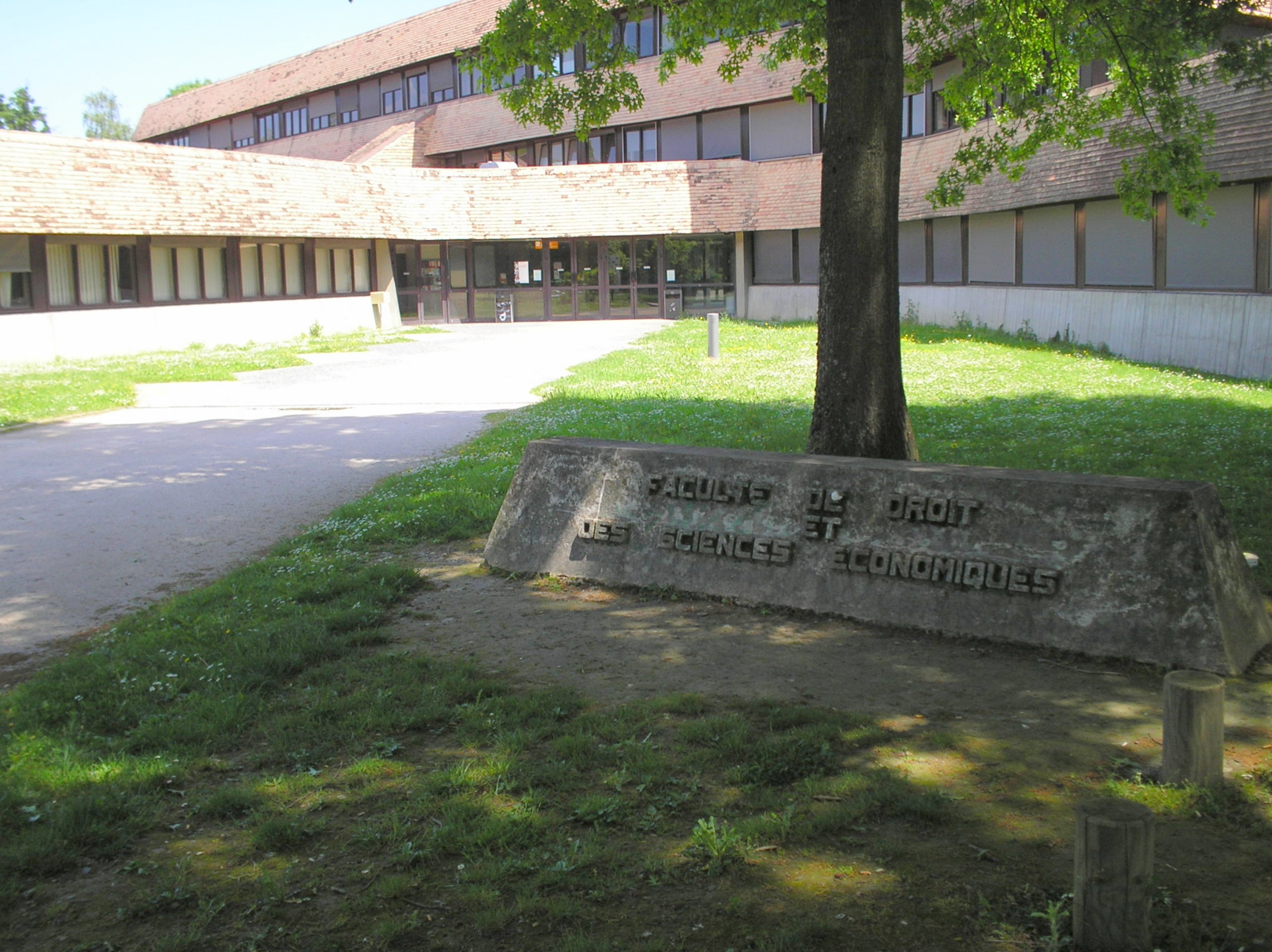 Entrée de la fac de droit de l'UPPA